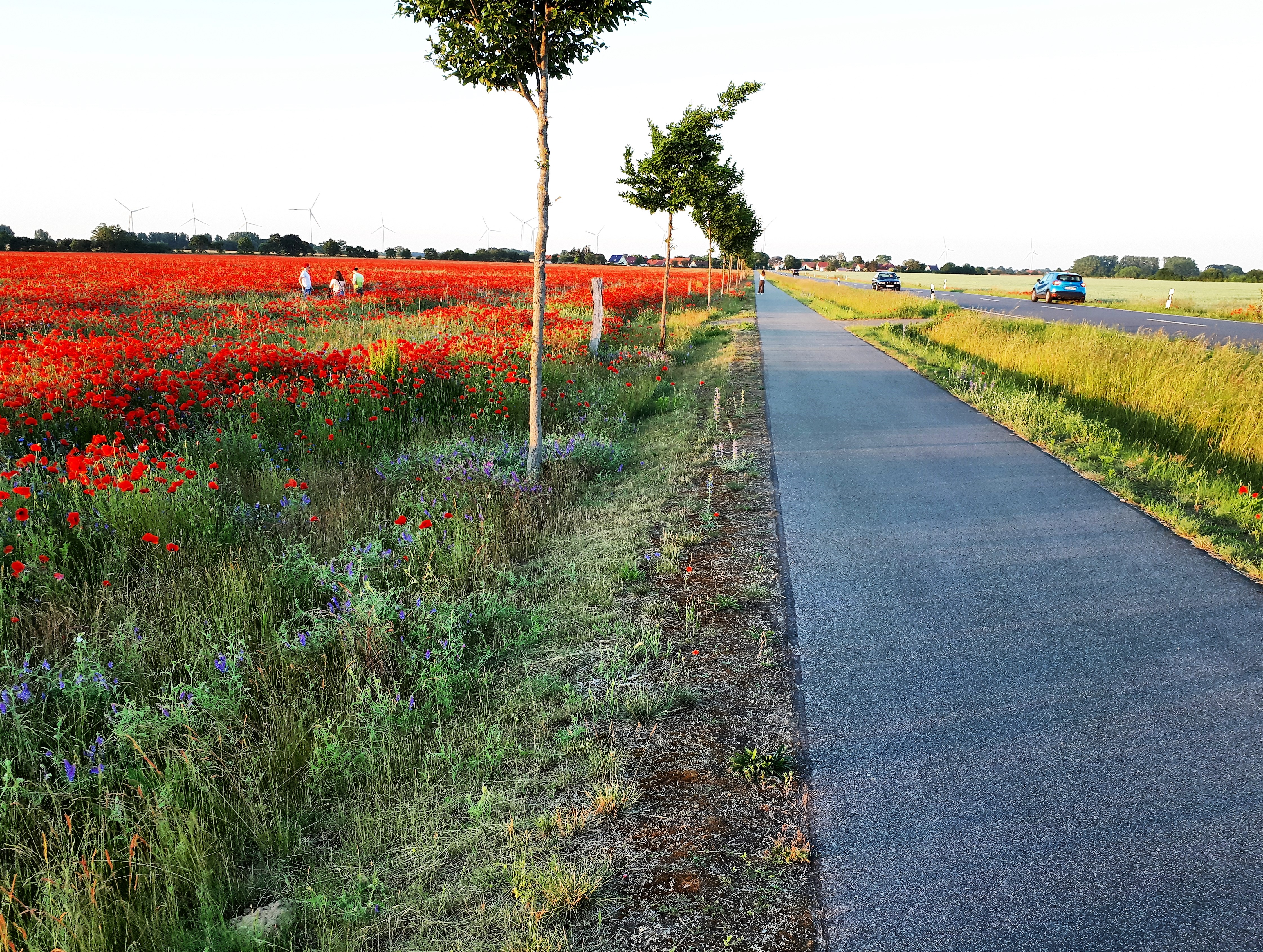 Klatschmohn an der B167 vor Dabergotz in Brandenburg